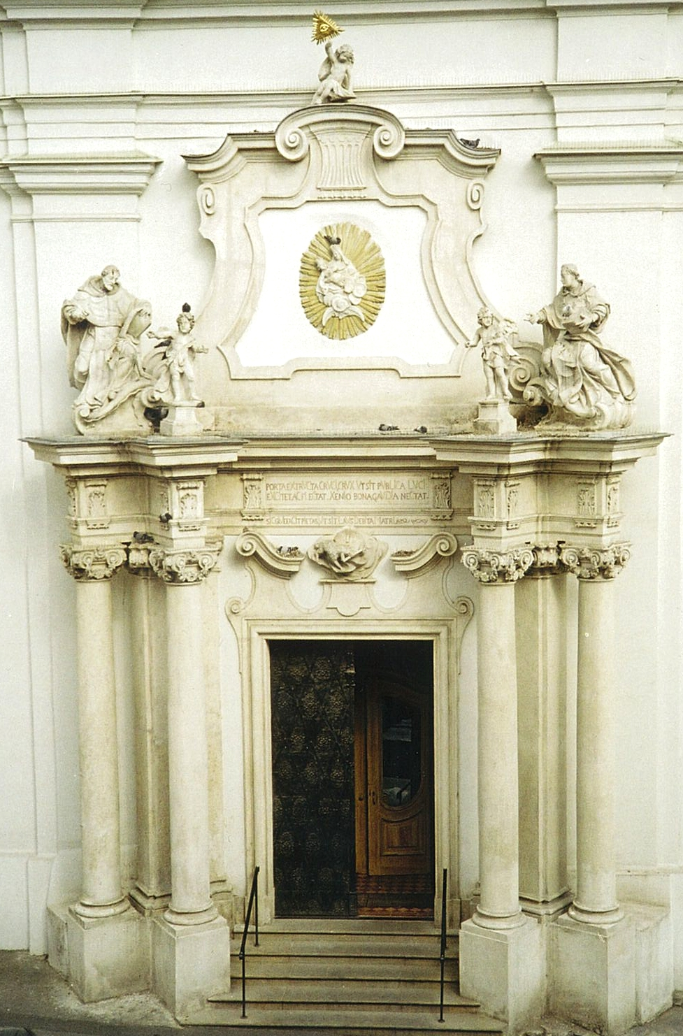 Portal_der_Dominikanerkirche_Znaim